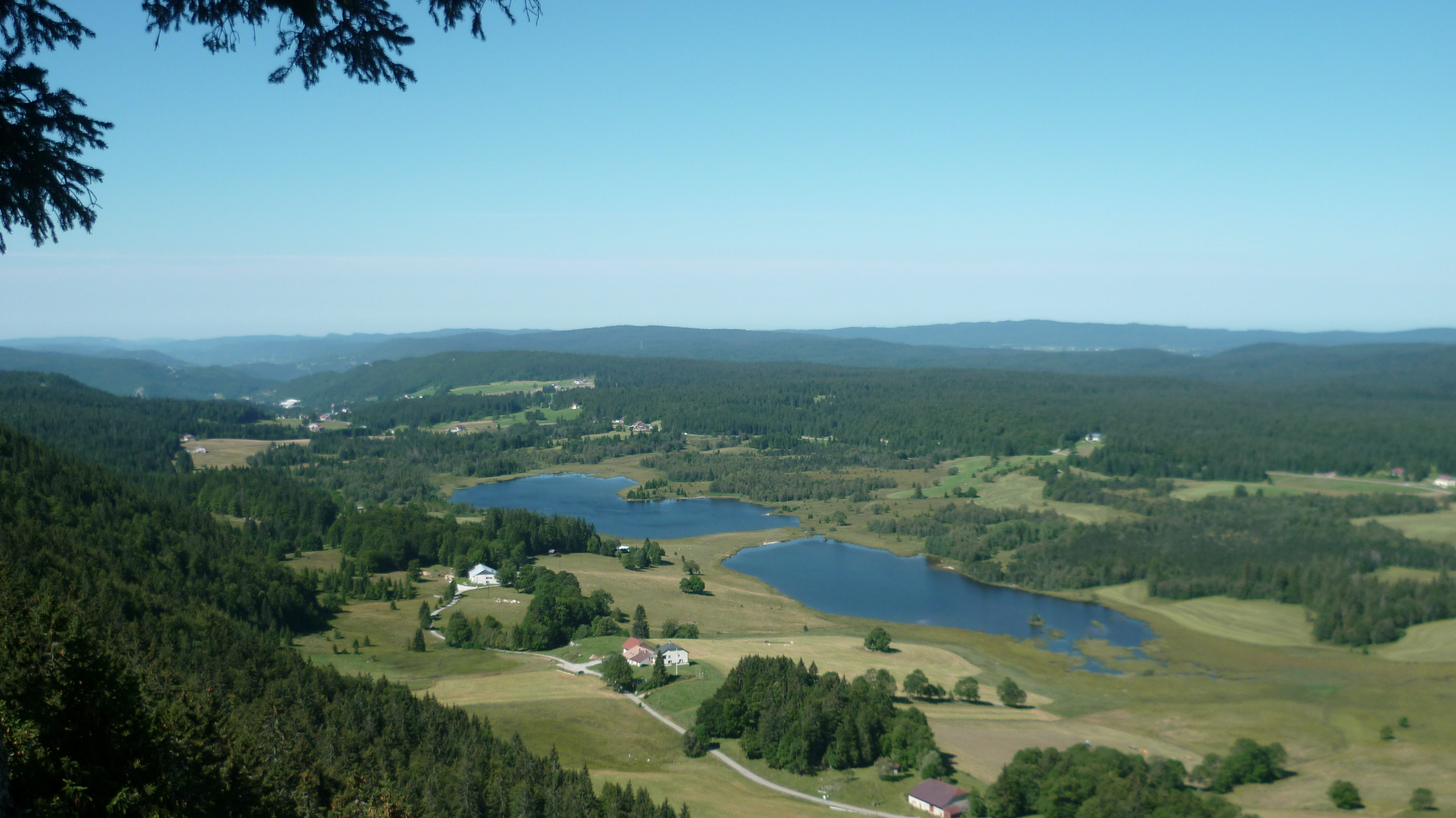 Le lac de Bellefontaine (à gauche) et le lac des Mortes (à droite), photo prise de la crête à la frontière franco-suisse.